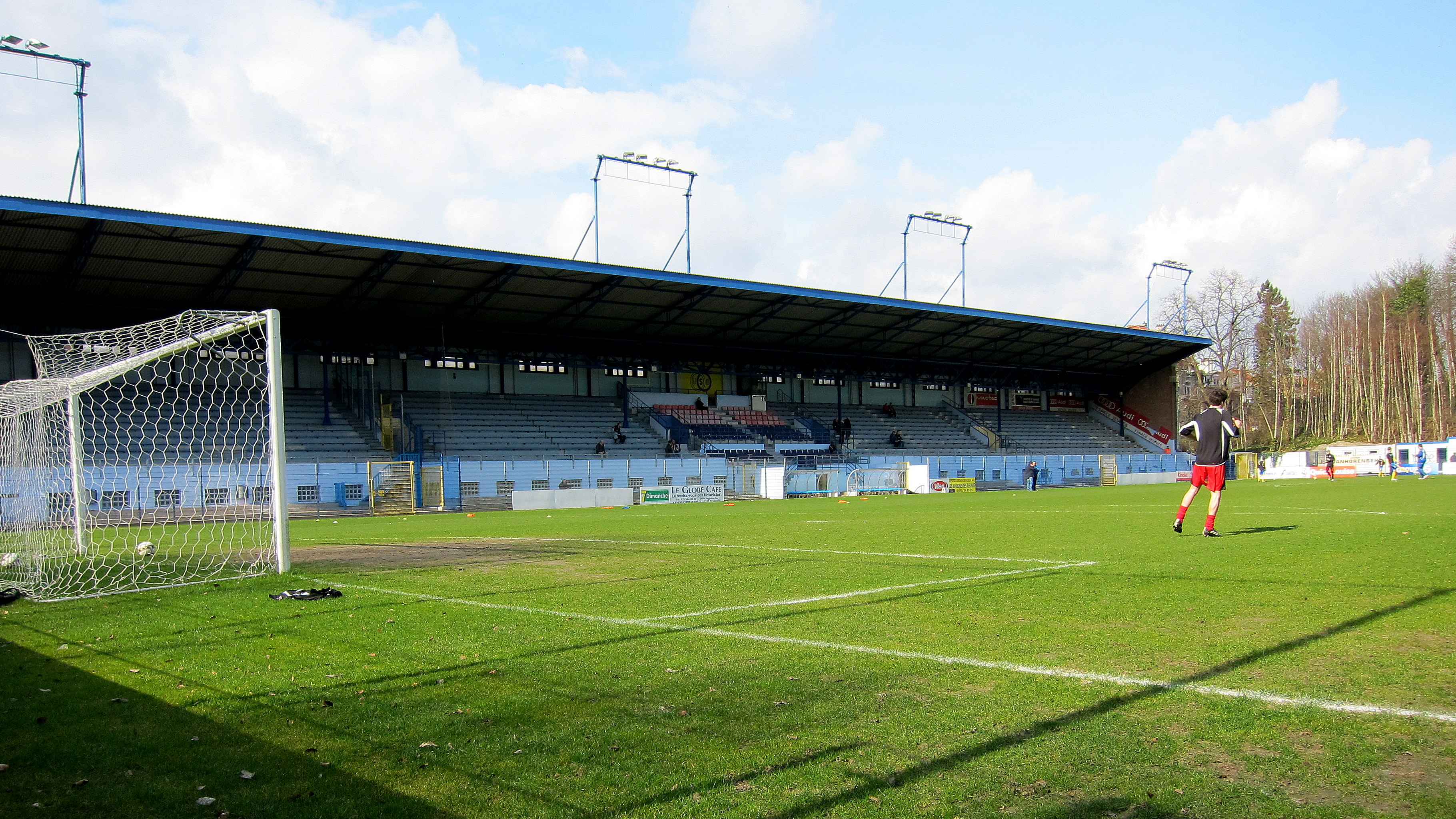 Het Joseph Marienstadion te Vorst, Brussel - stadion van Royale Union Saint-Gilloise